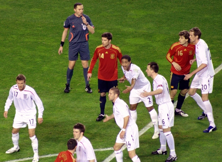 Partido amistoso España - Inglaterra celebrado el 11 de febrero de 2009, en el estadio Sanchez Pizjuán(Sevilla)